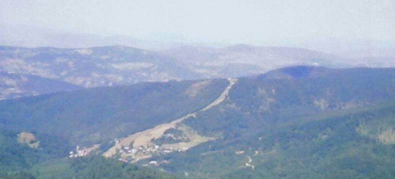 Mosorny Groń widziany z Kępy (Beskid Żywiecki).Mosorny Groń seen from Kępa (Beskid Żywiecki).